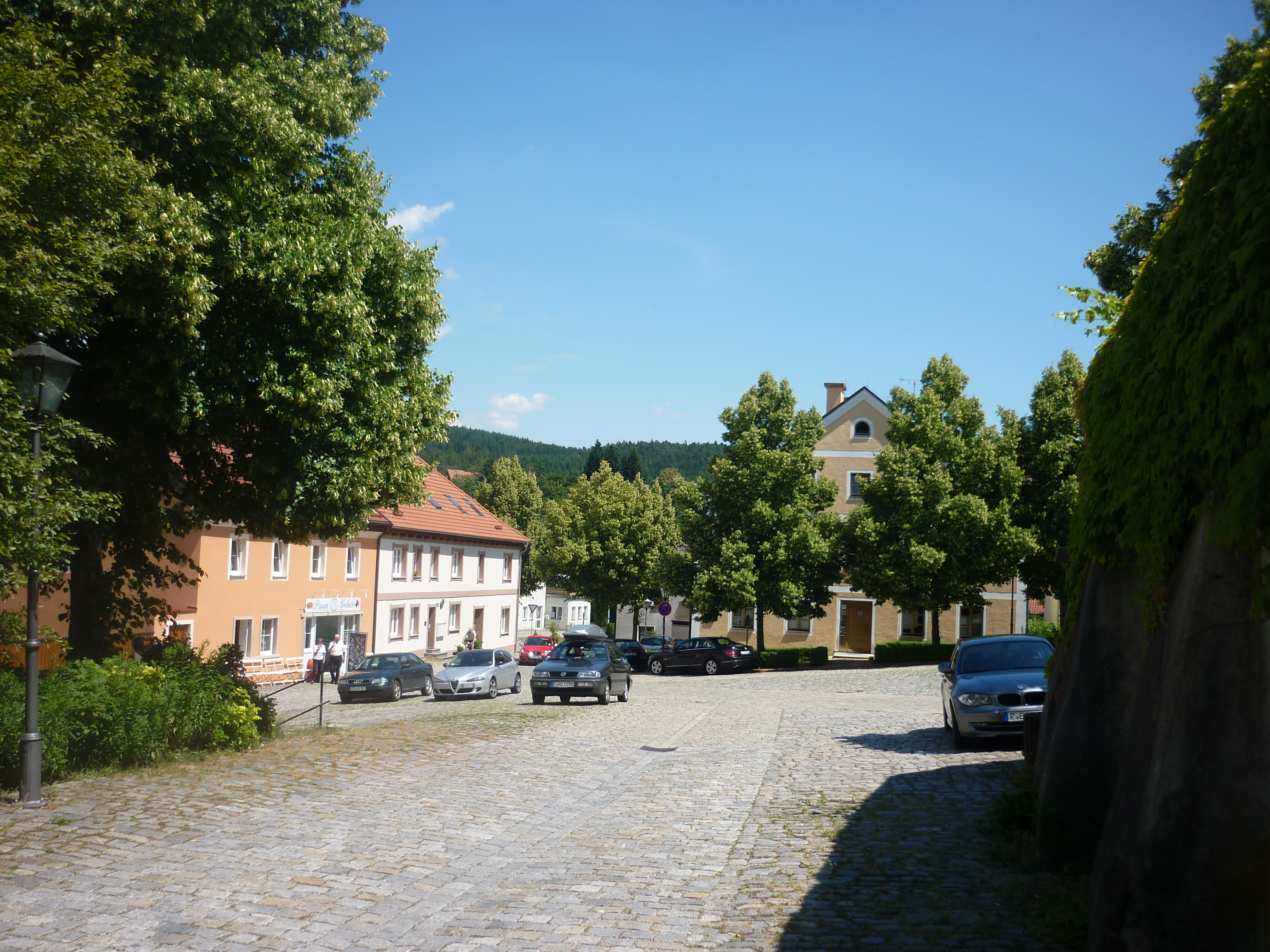 Petersplatz Wörth an der Donau